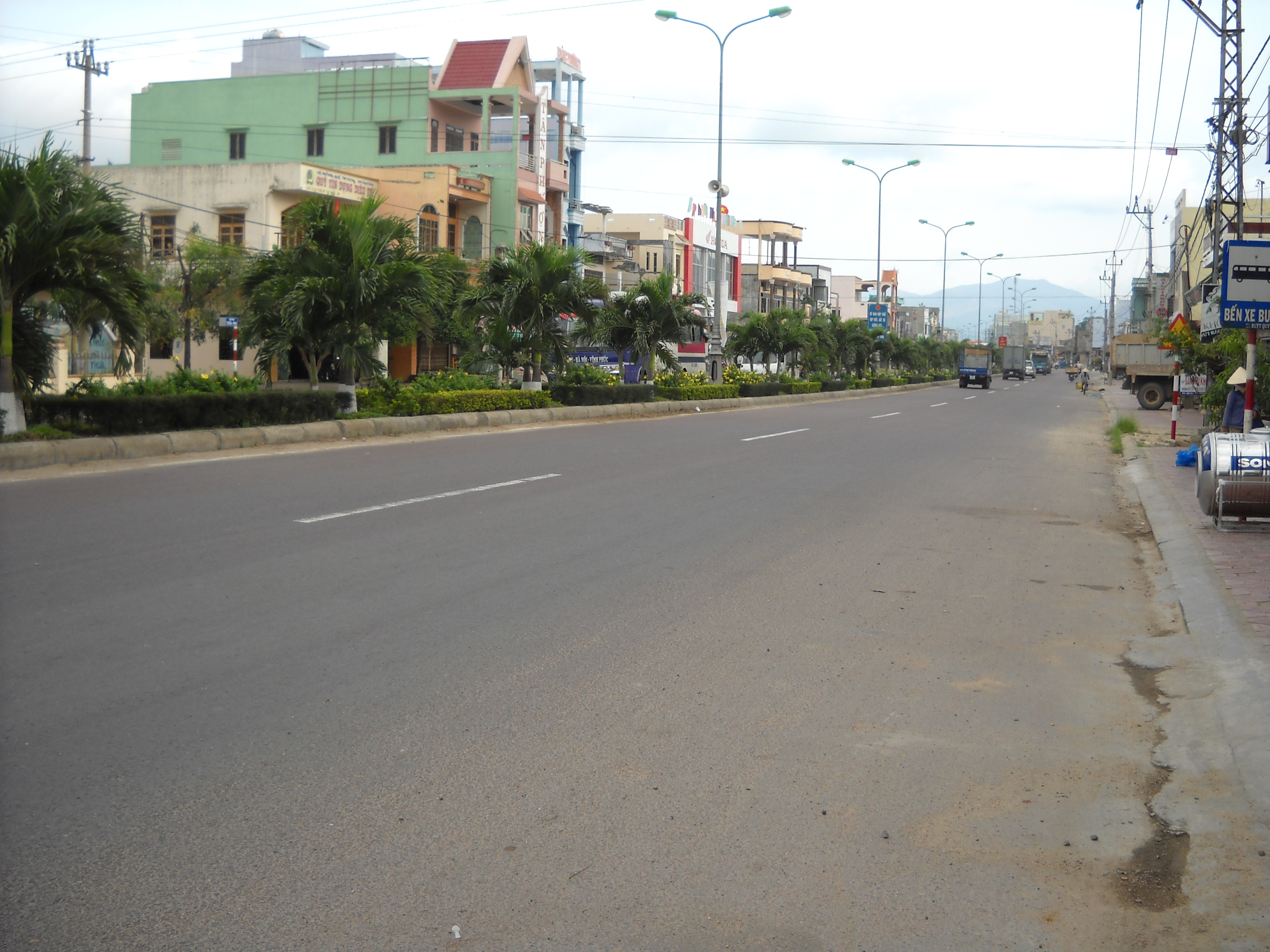 Thị trấn Diêu Trì, Tuy Phước